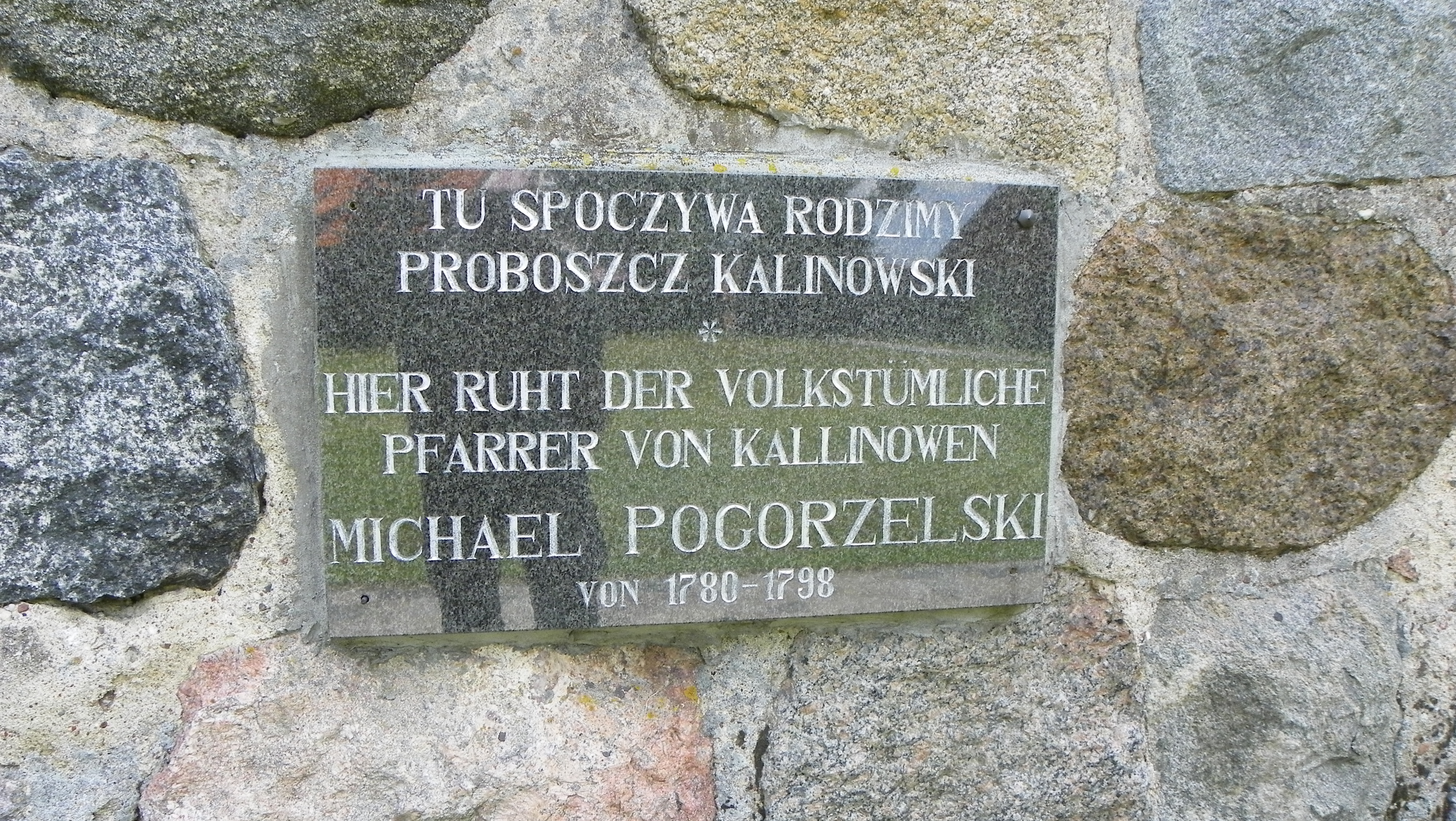 Tablica na ścianie kościoła p.w. Wniebowzięcia NMP we wsi Kalinowo (powiat ełcki).